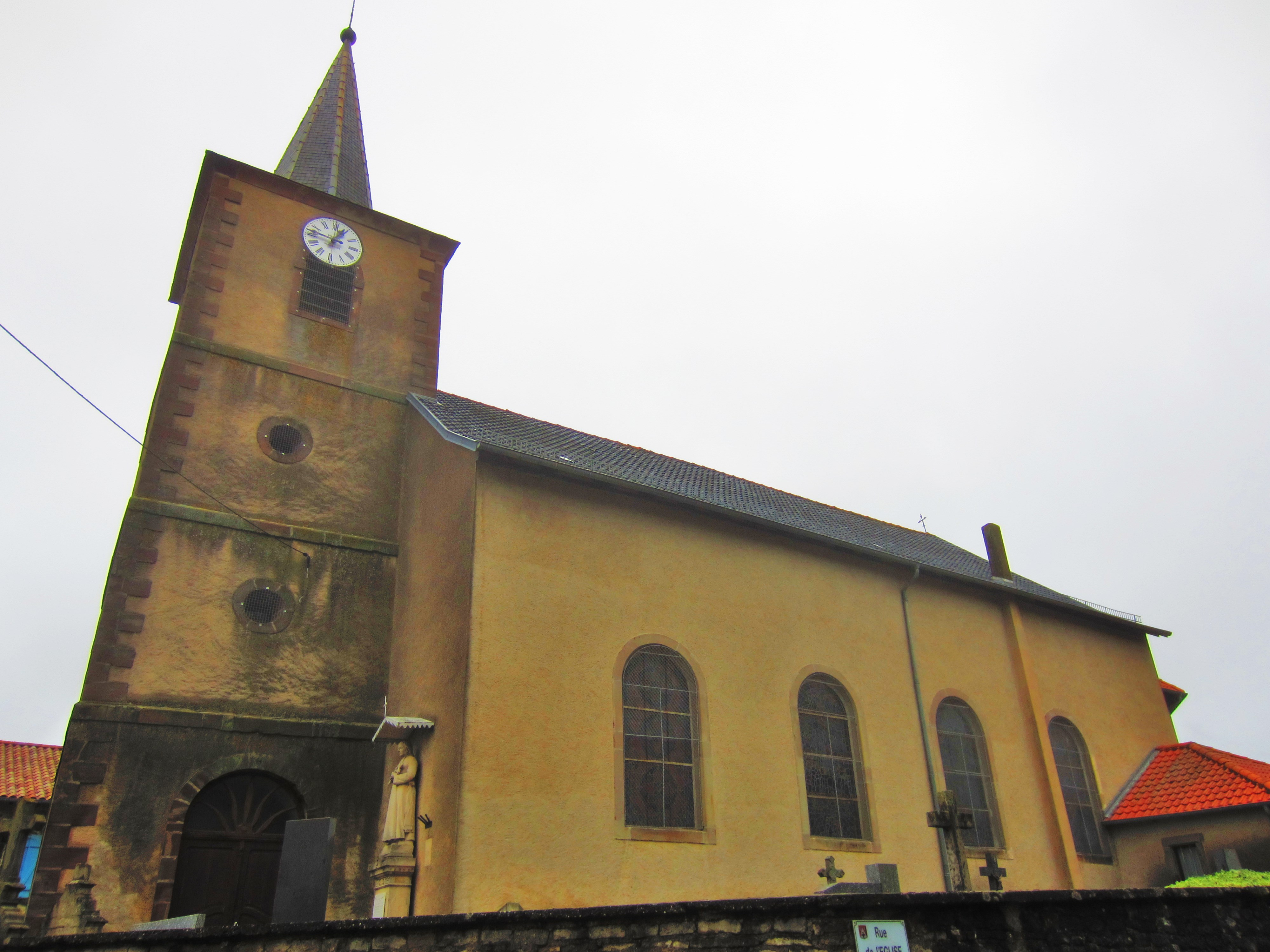 Eglise Cutting